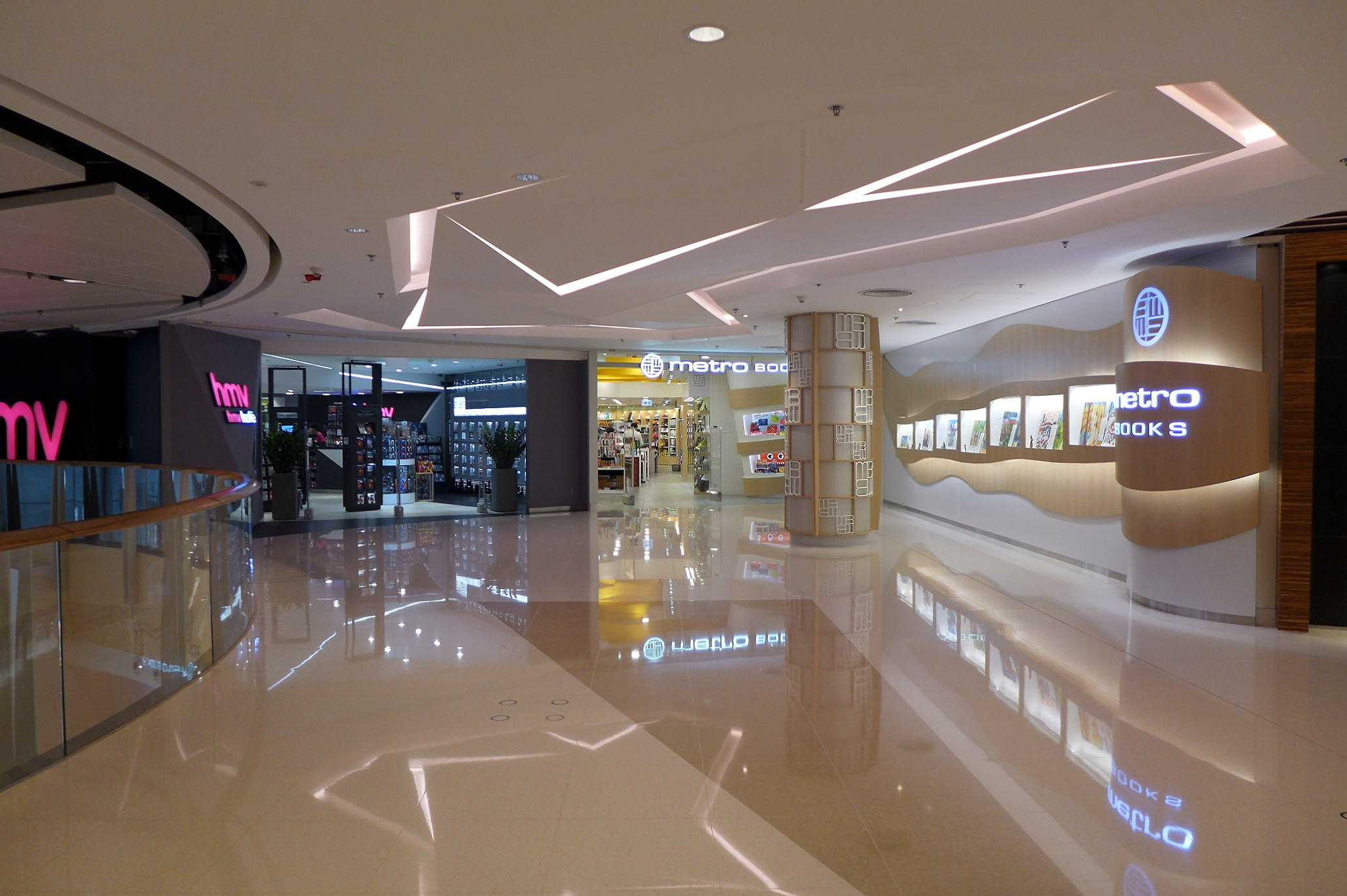 HMV & MetroBooks in Elements